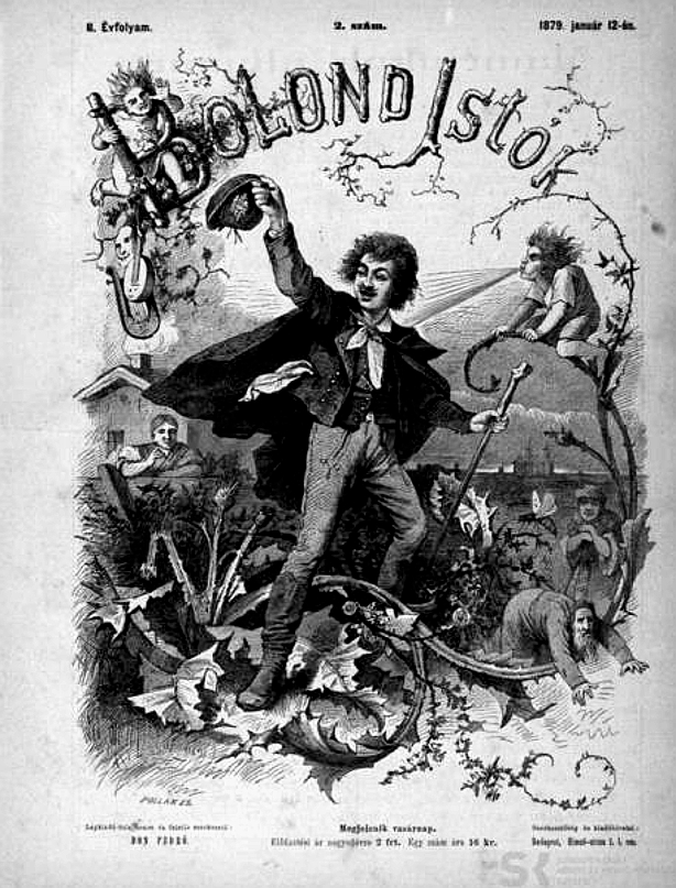 Bolond Istók. XIV. évfolyam, 1891. 46.szám. Budapest, november 15-ei címlapja Pollák Zsigmond rajza